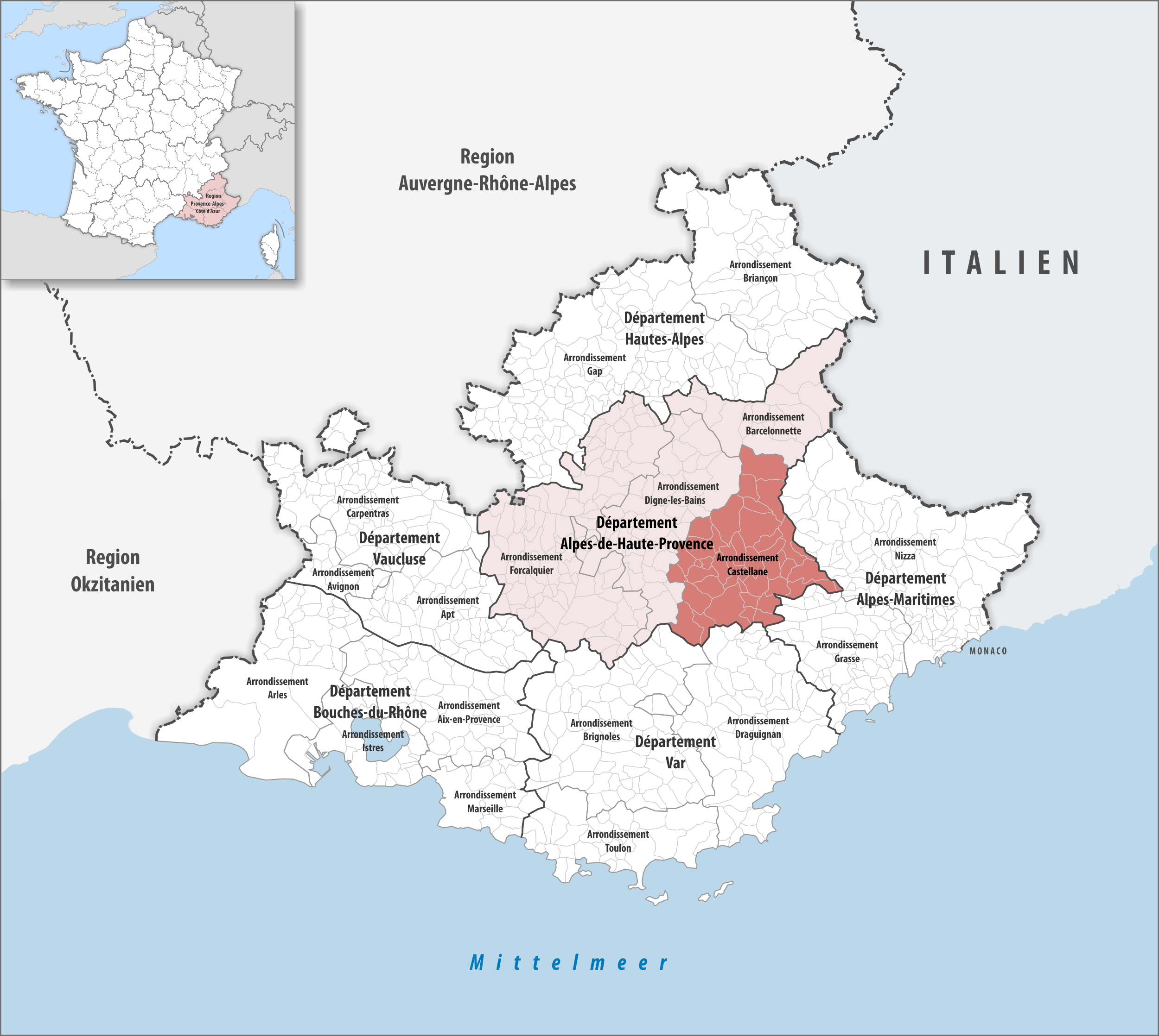 Lage des Arrondissements Castellane